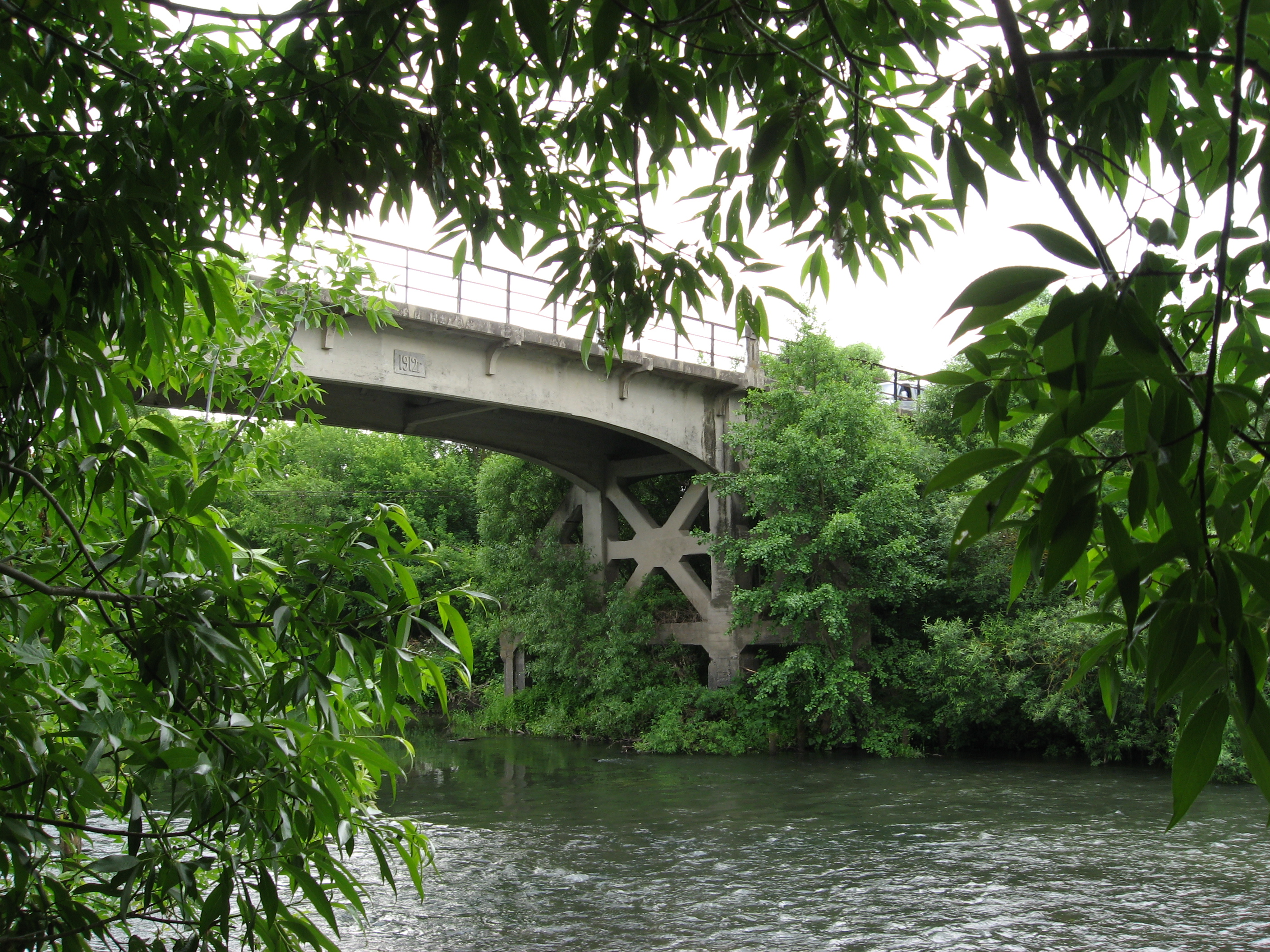 с. Лопатино (Пензенская область). Старый мост. 1912 г.